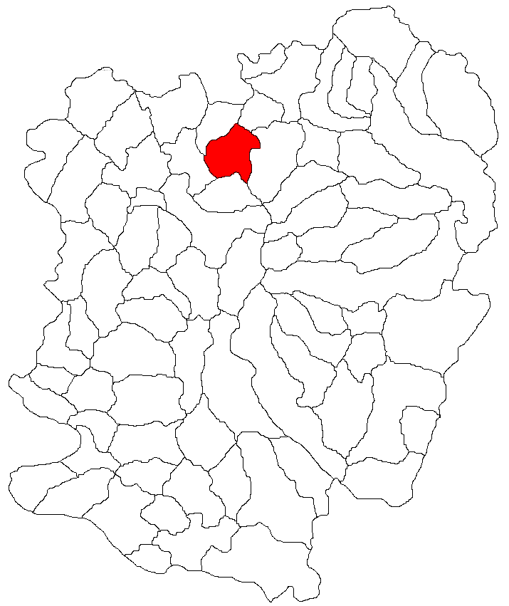 Categorie:Hărţi ale judeţului Caraş-Severin